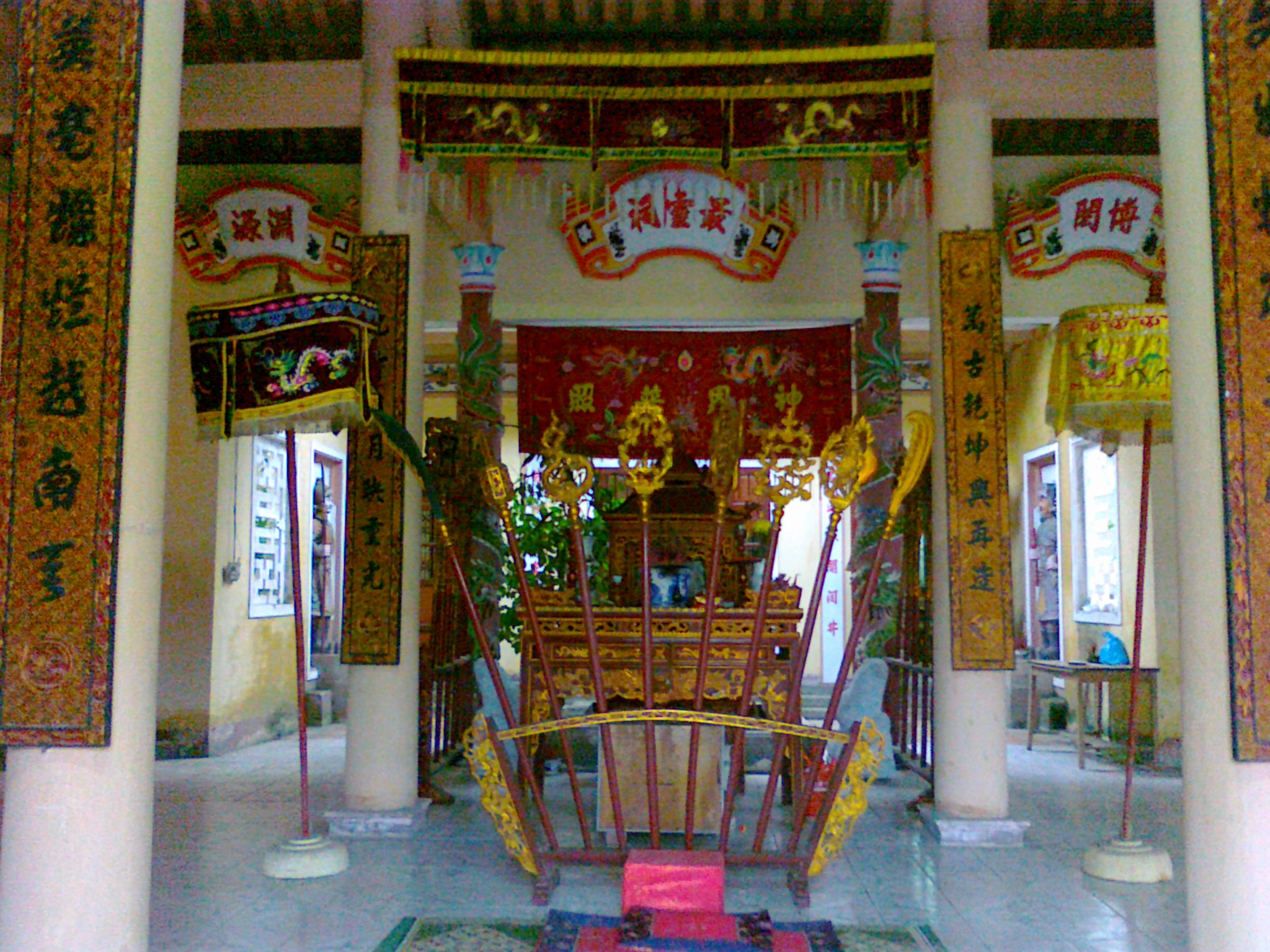 Ảnh chính điện.